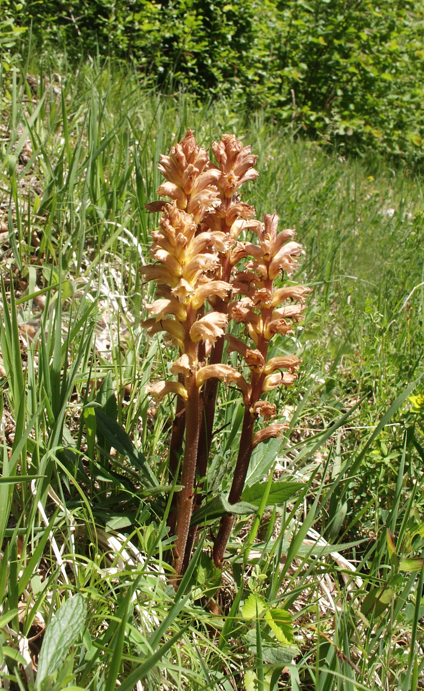 Orobanche lutea, Mittlere Kuppenalb, Deutschland